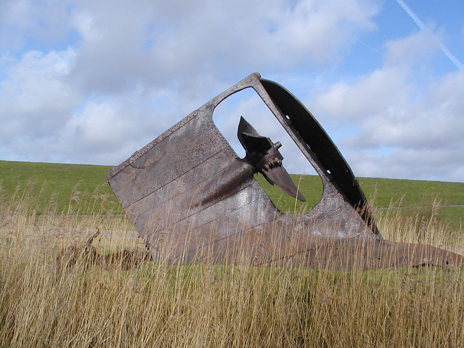 Teil des Wracks vom englischen Dampfer "Kaffraria"